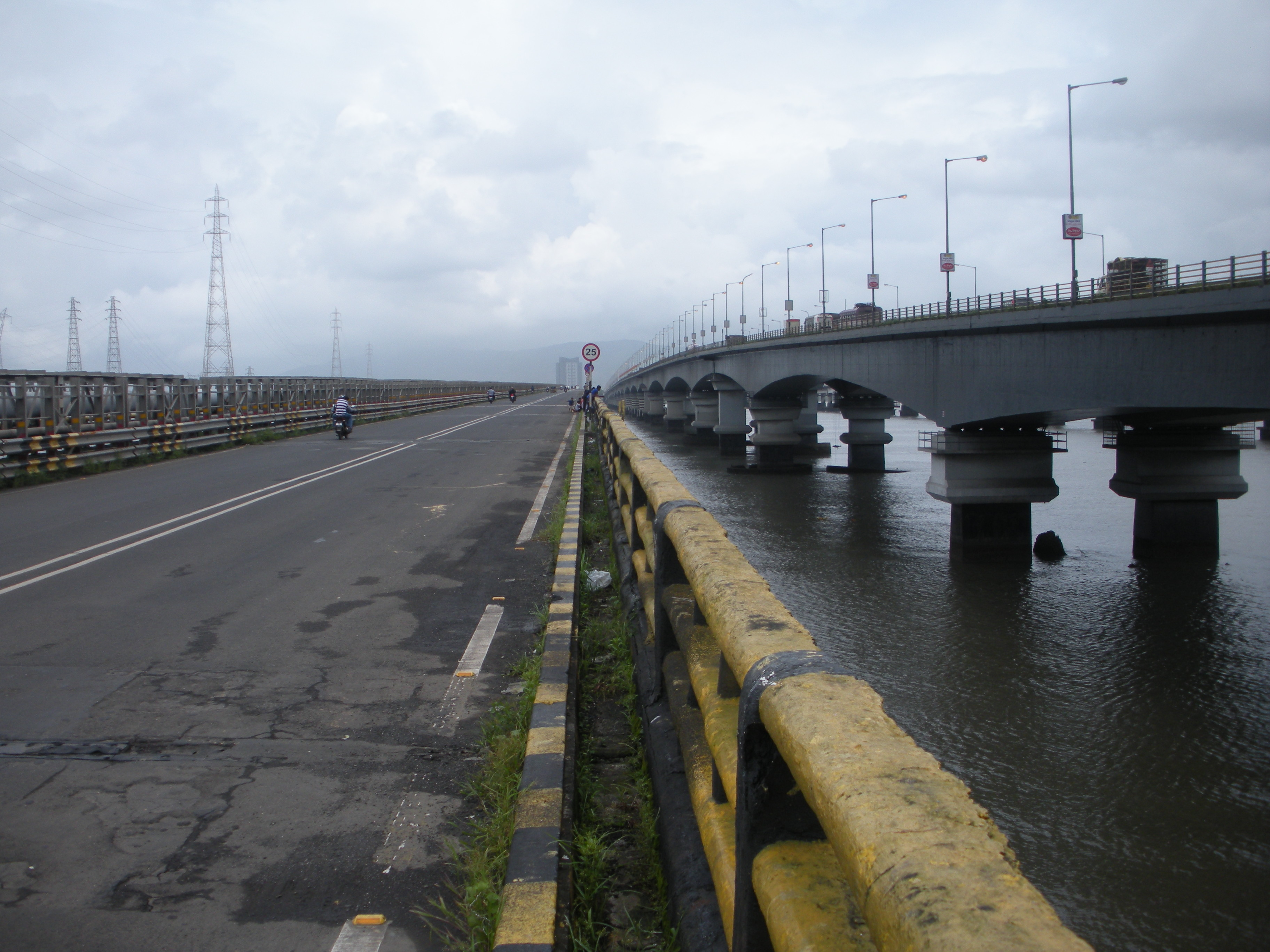 വാഷി പാലങ്ങൾ, പഴയതും പുതിയതും.